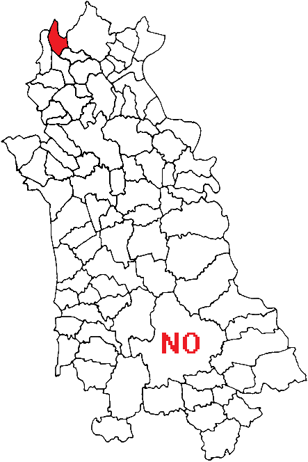 Mappa con posizione del comune nella provincia italiana di Novara